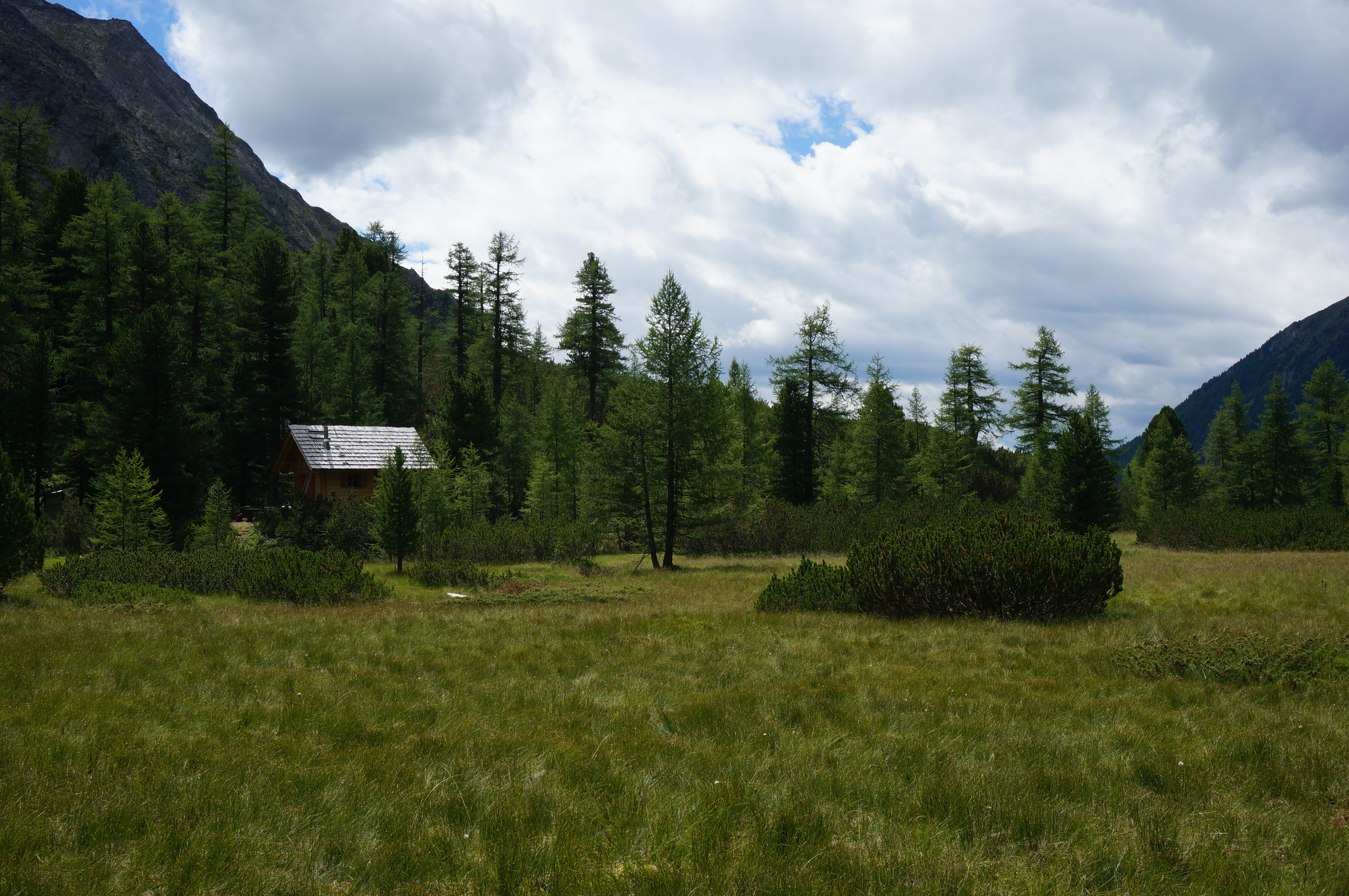 Moosboden (1.949 m) im Kaponigtal Gemeinde Obervellach, Bezirk Spittal an der Drau, Nationalpark Kärnten, Österreich, EU